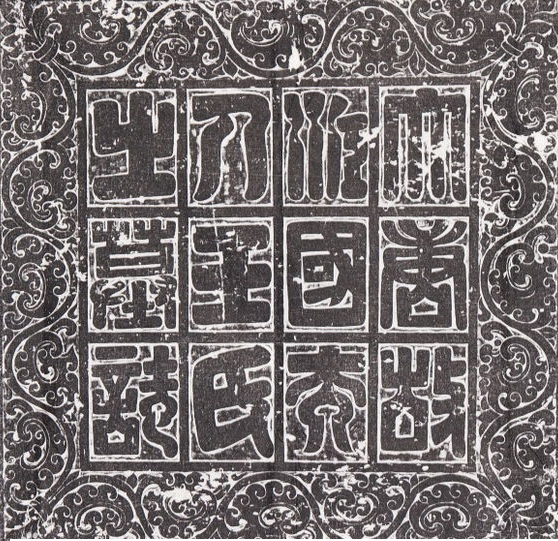 中文（台灣）: 《唐左光祿大夫江國公陳叔達夫人王氏墓誌》